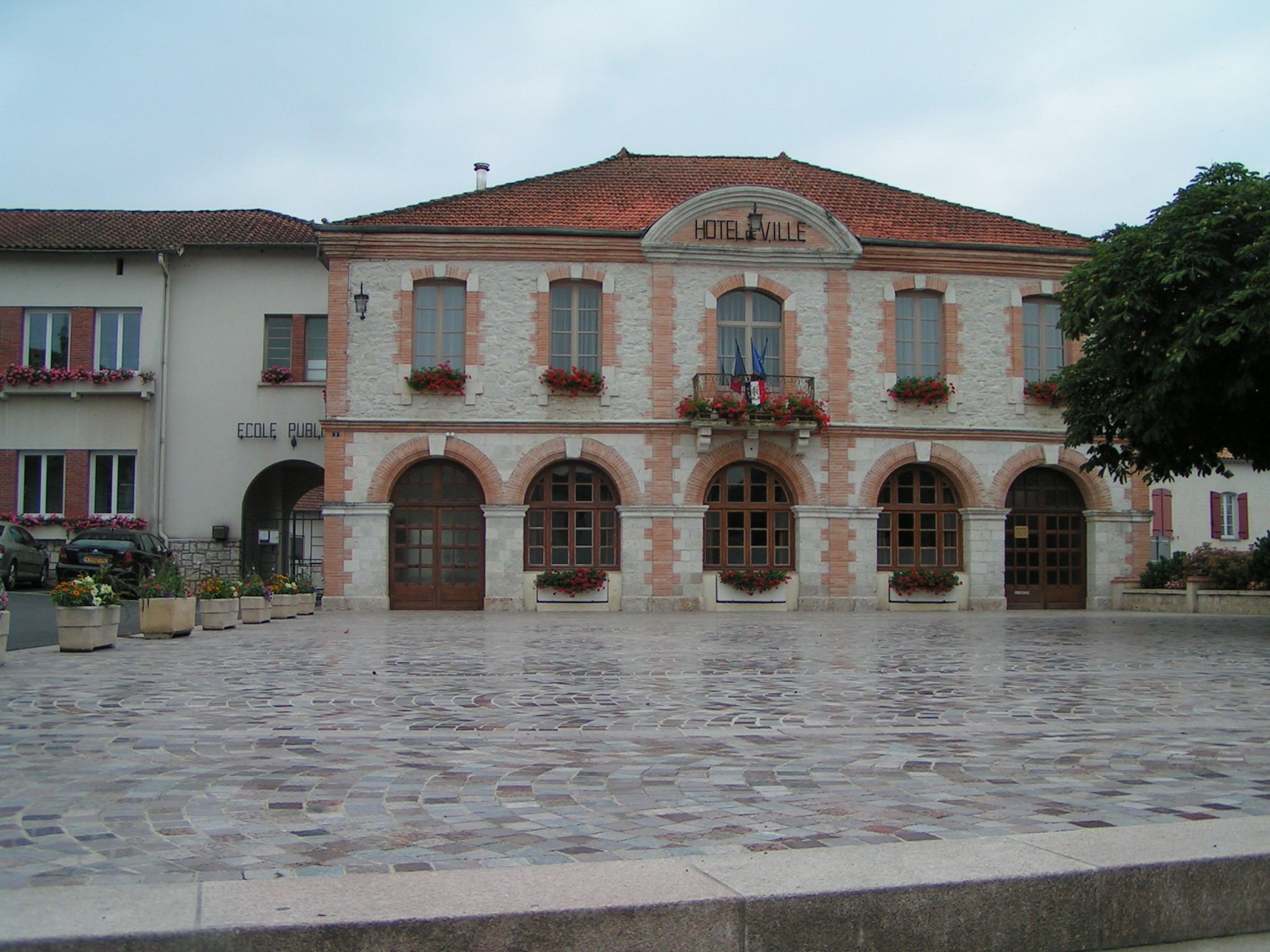 Mairie de Cazes-Mondenard